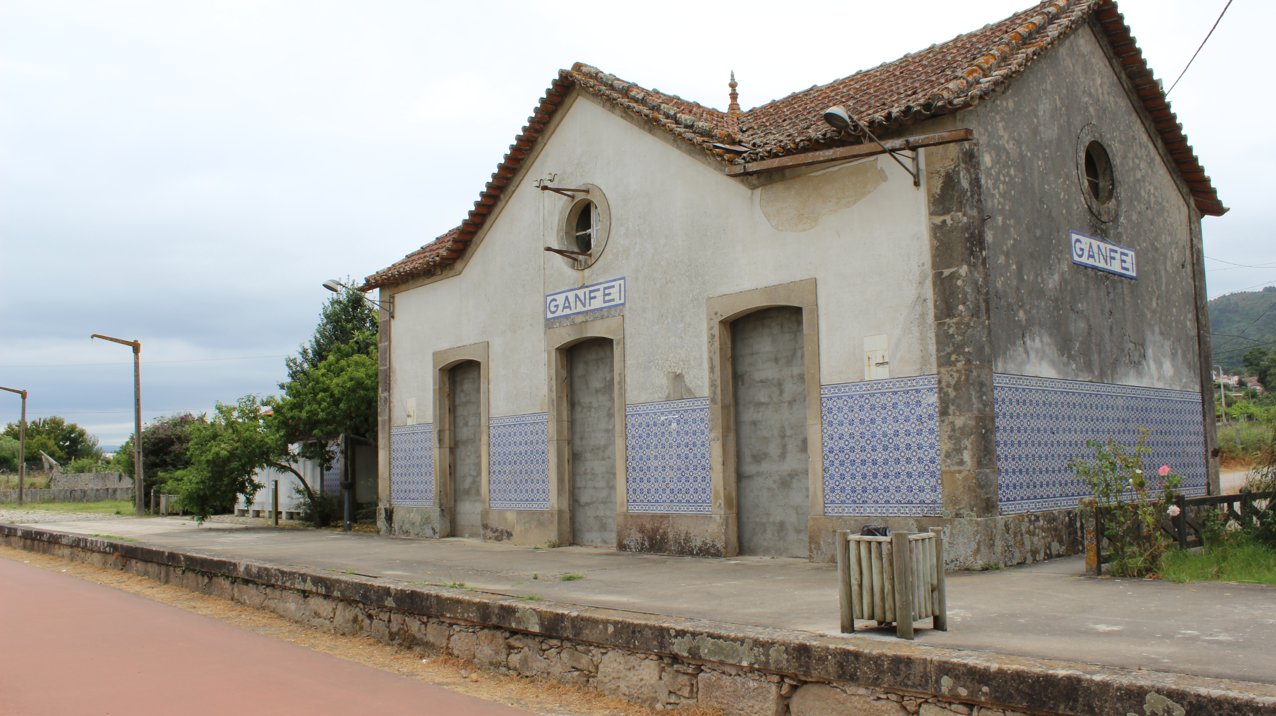 Ecopista